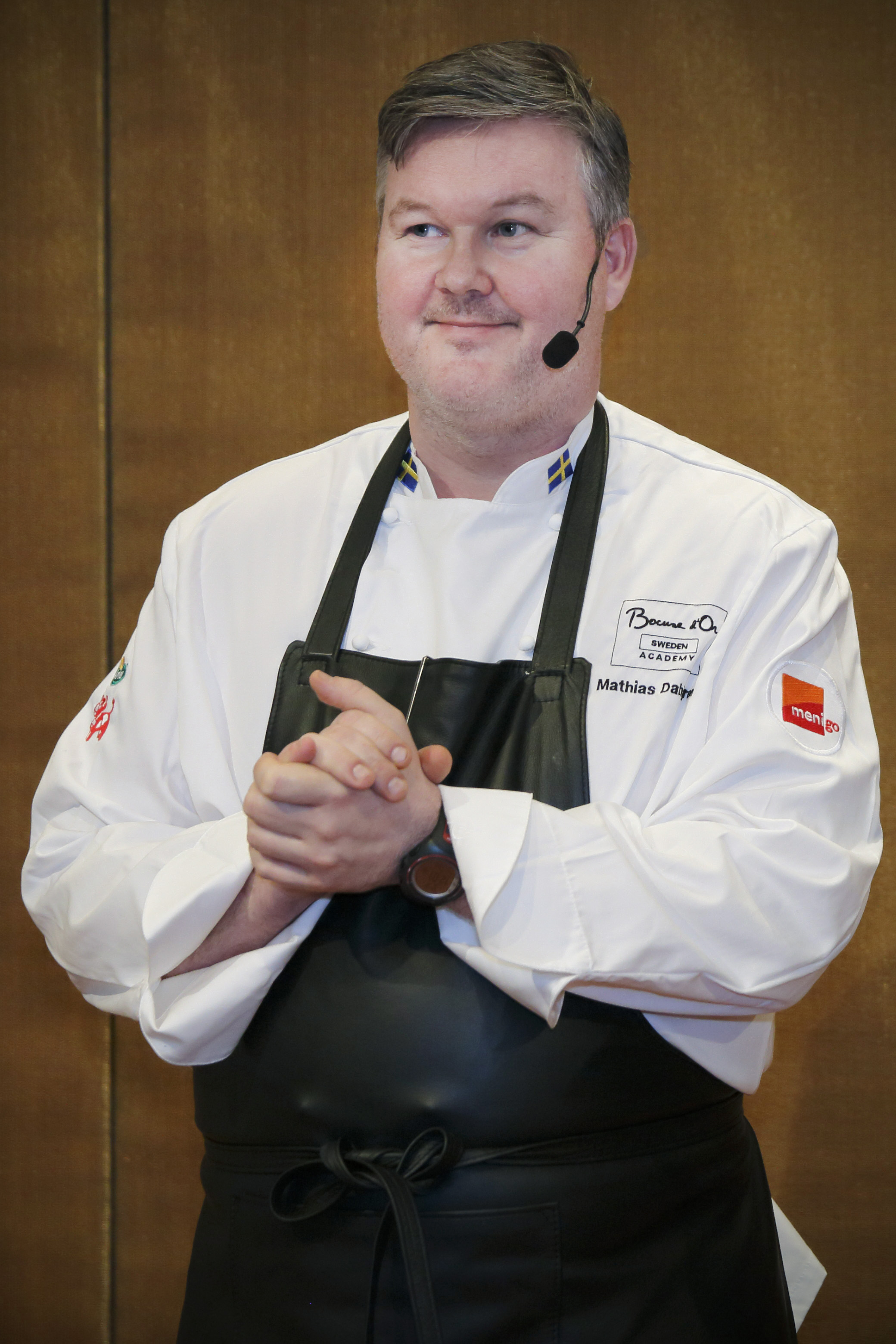 Den svenske kocken och krögaren Mathias Dahlgren.